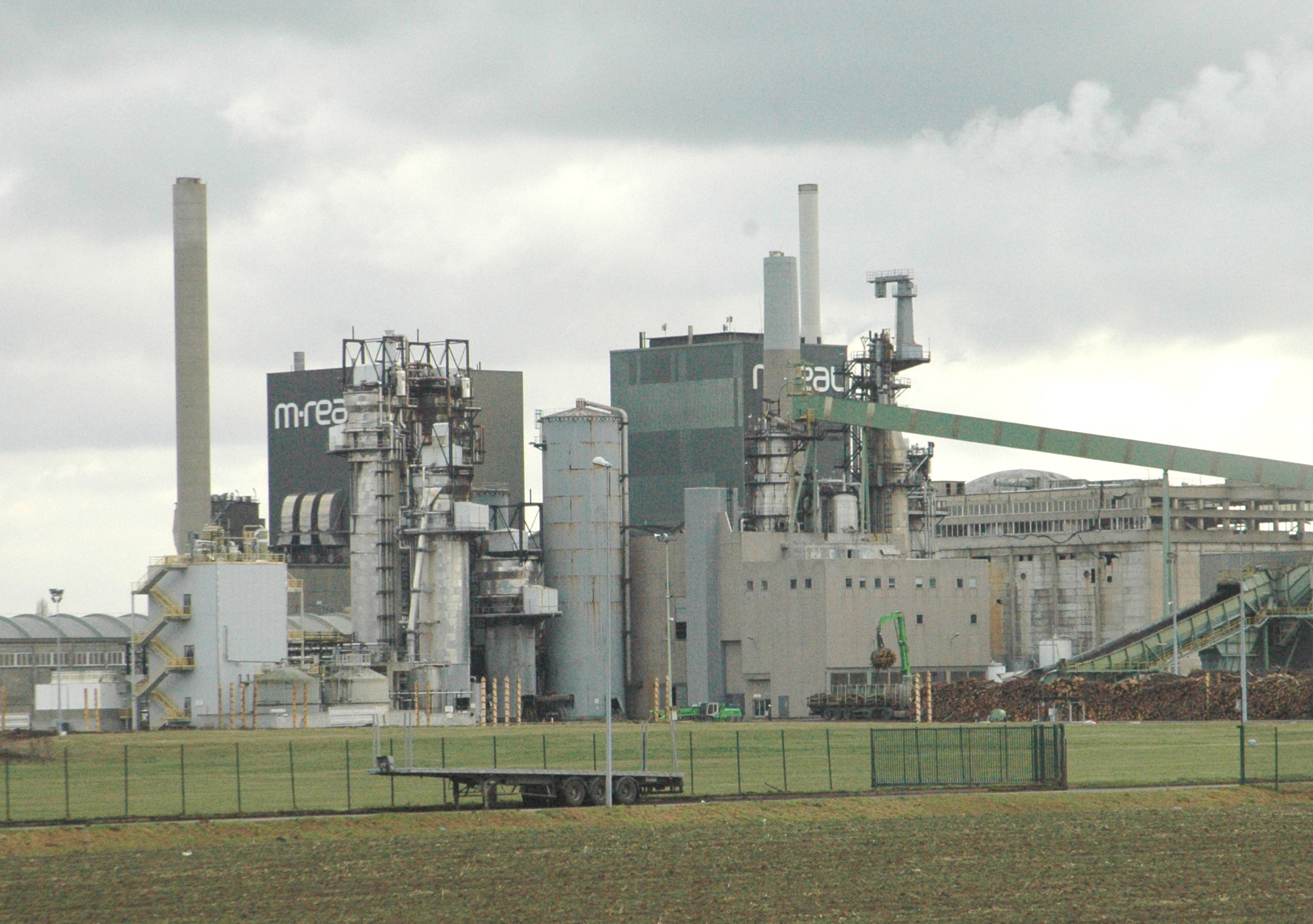 Entreprise Mreal